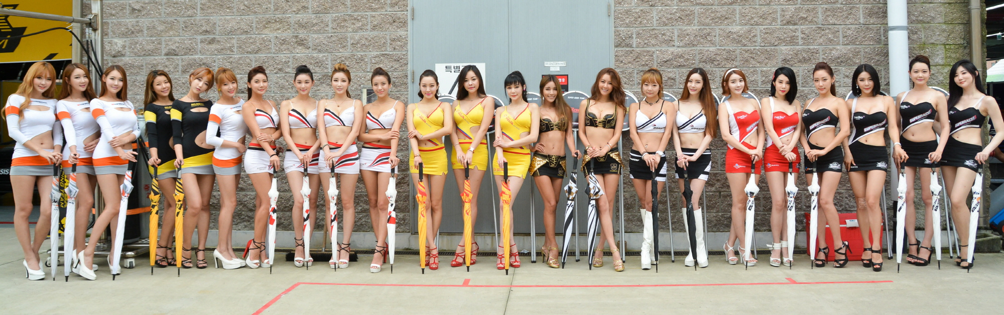 2014년 CJ 슈퍼레이스 참가 레이싱모델